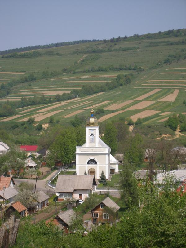 Церква терезіанського типу збудована у 1828 р.